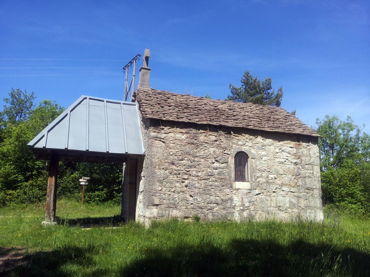 Chapelle Notre-Dame de l'Étoile ou chapelle « des Chasseurs » située à Napt (ancienne commune), hameau de Sonthonnax-la-Montagne (Ain).